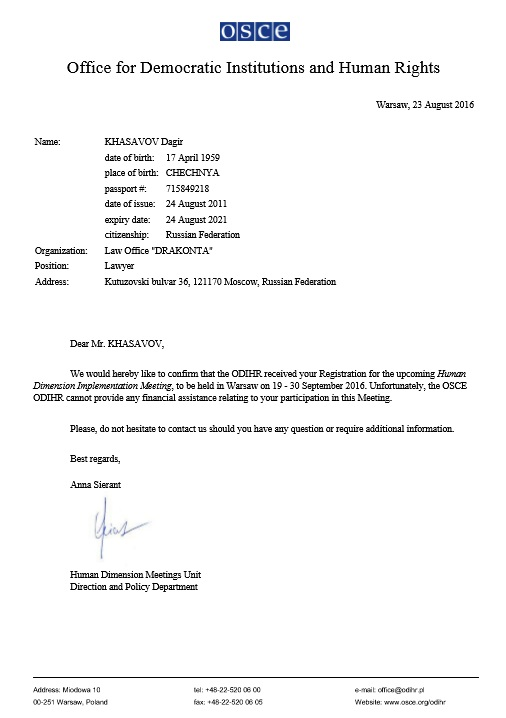 Приглашение на конференцию по реализации мер по вопросам человеческого измерения